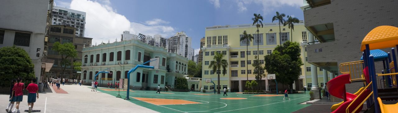 澳門培正中學全景圖II